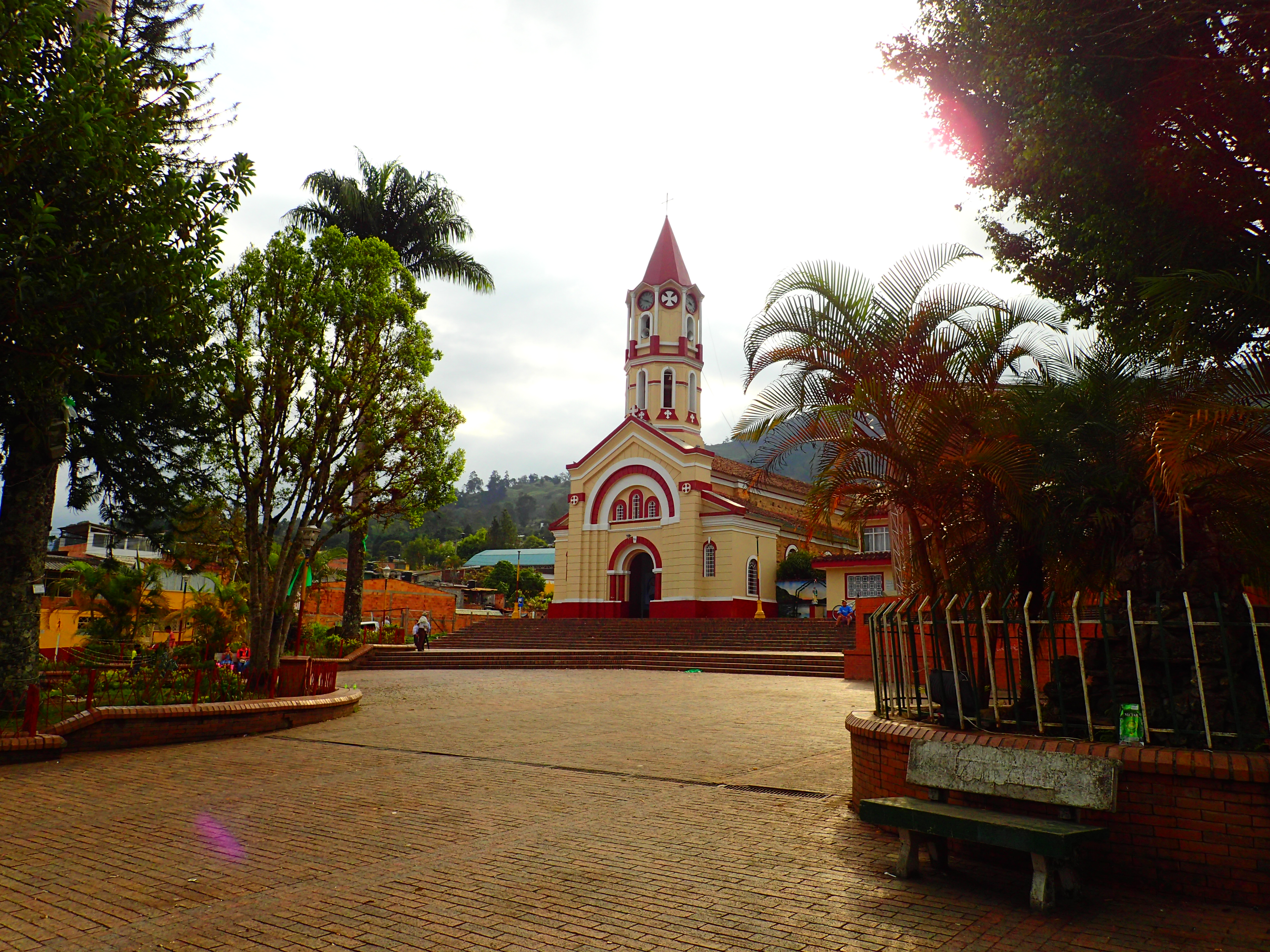 Esta fotografía fue tomada en el municipio colombiano con código 25293.